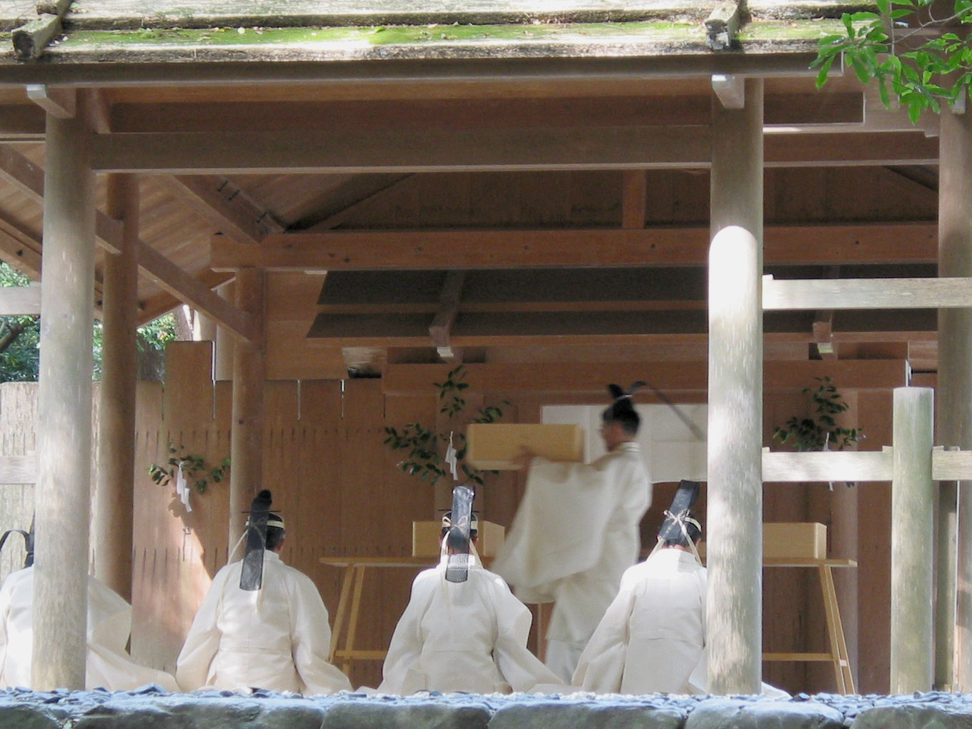 Kanmiso-sai (Aramatsuri-no-miya in Naiku) 神御衣祭（皇大神宮・荒祭宮）